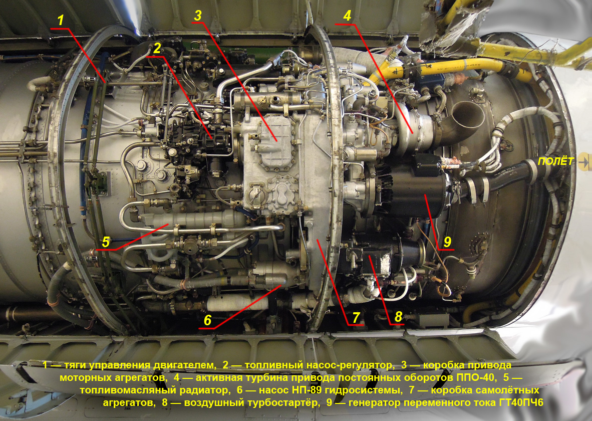 Агрегаты двигателя НК-8-2У самолётов Ту-154А, Ту-154Б всех модификаций